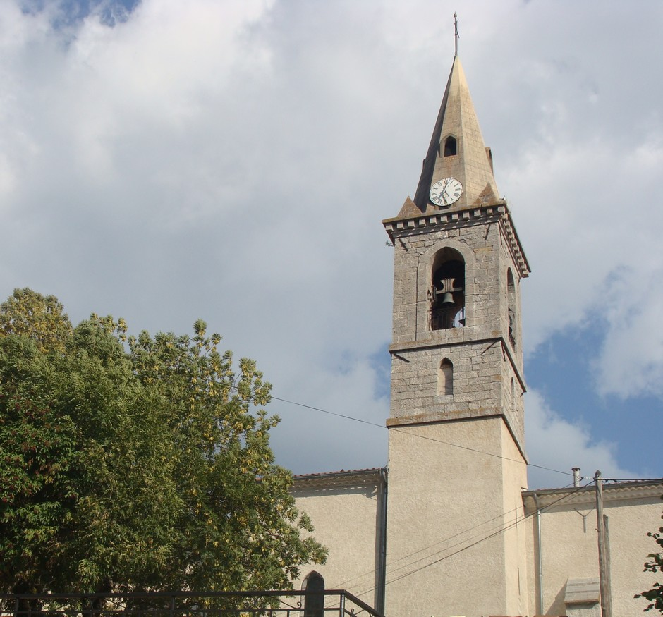 Le clocher de l'église de Turriers : tour de section carrée ajourée dans sa partie supérieure pour loger les cloches, flèche octogonale entourée de quatre pointes dans le style haut-alpin, sur base crénelée.